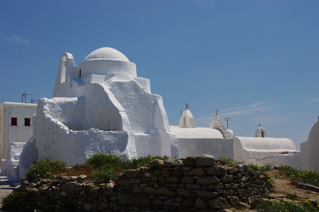 Paraportiani, Mykonos